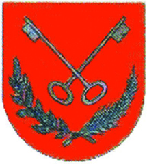 Escut de Bellcaire d'Urgell